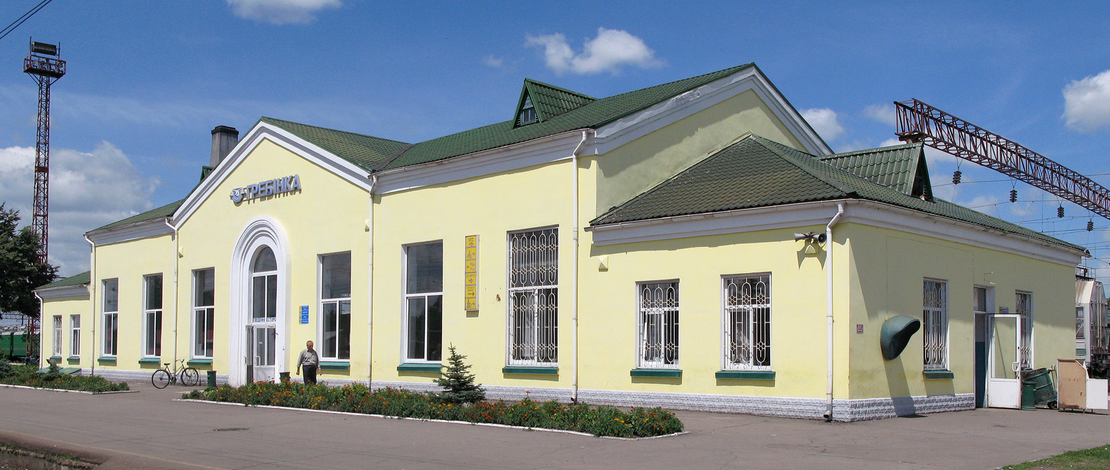 Вокзал станції Гребінка